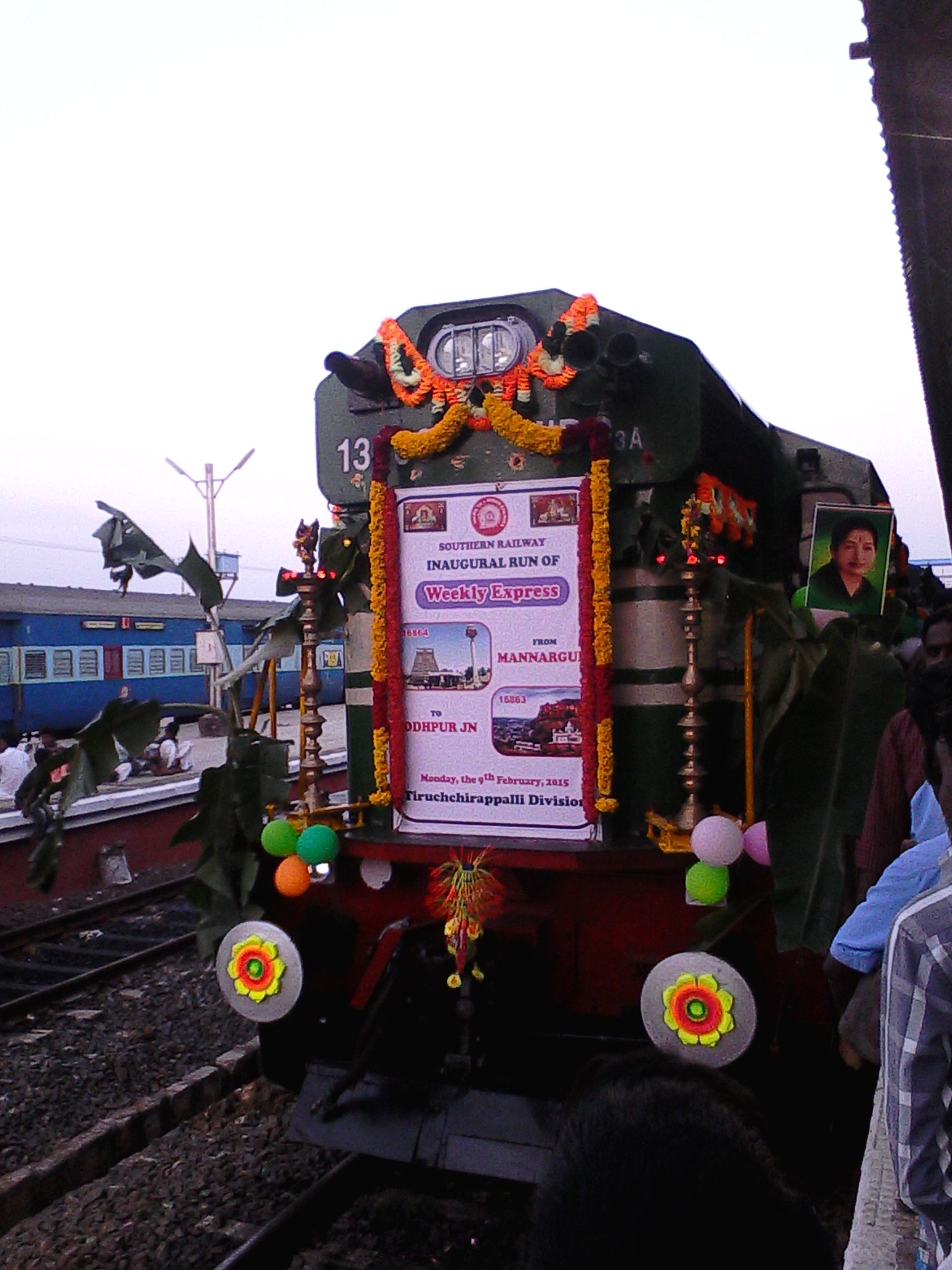 மன்னார்குடியிலிருந்து ஜோத்பூர் முடிய வாரந்தோறும் திங்கட்கிழமை அன்று செல்லும் தொடர்வண்டியின் முதல்பயணம்.